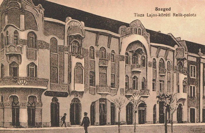 Reök palota, 1907, korabeli képeslapon